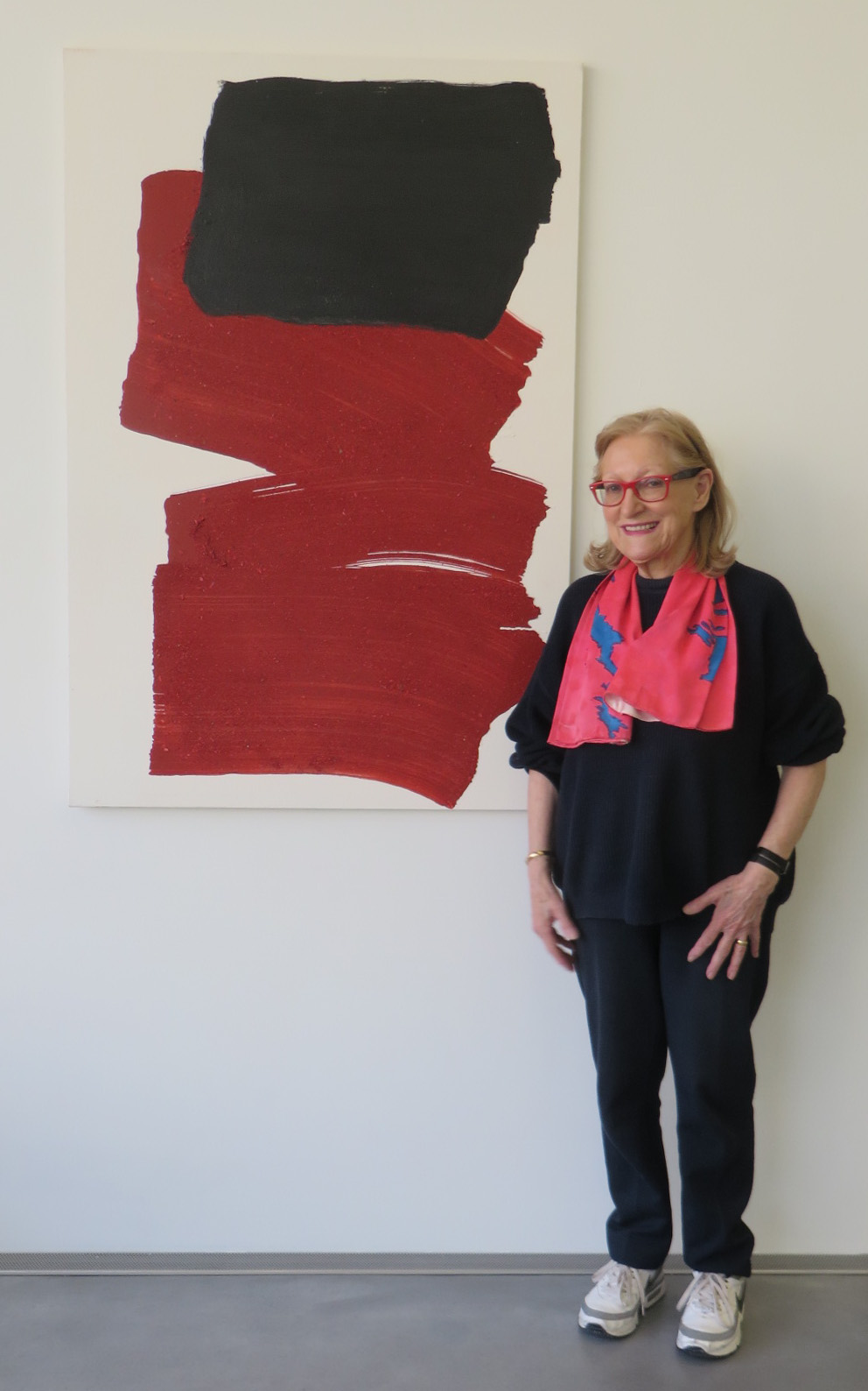 Künstlerin Roswitha Doerig 2016 vor ihrem Bild "Trio" 2015